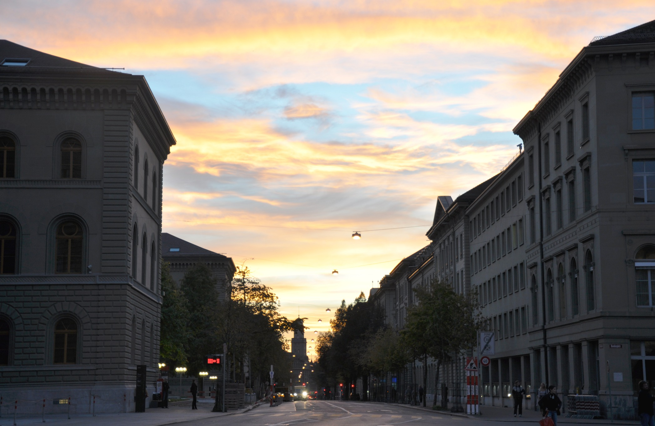 Bundesgasse